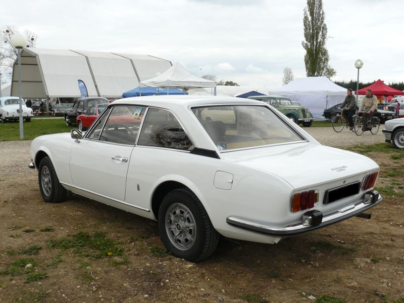 Mantes la Jolie 2012